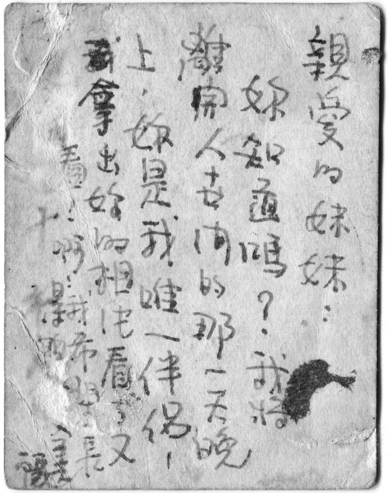 蔡鐵城被槍斃後，妹妹在她身上找到了寫在她相片後面的遺言。